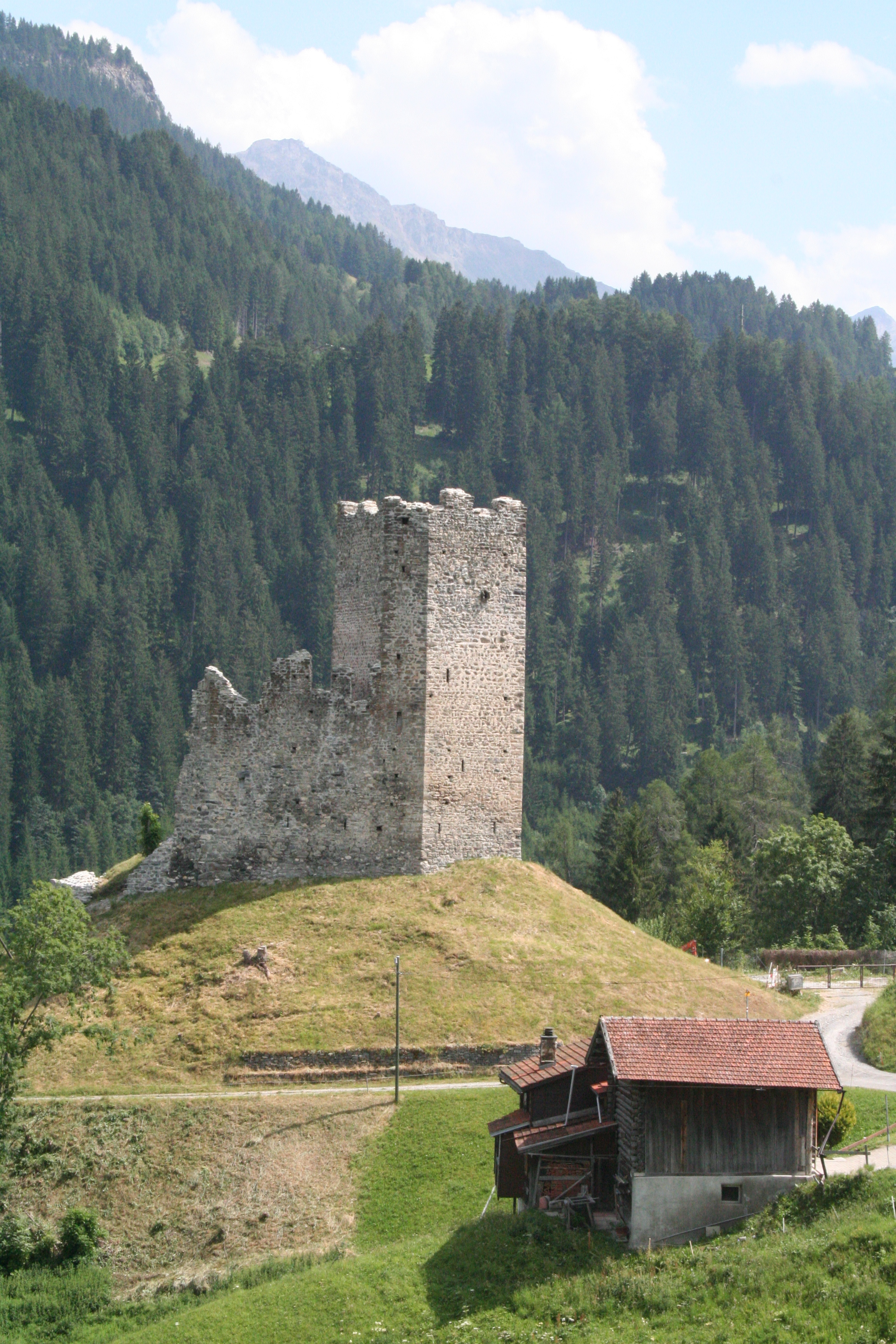 Turm von Nordwesten